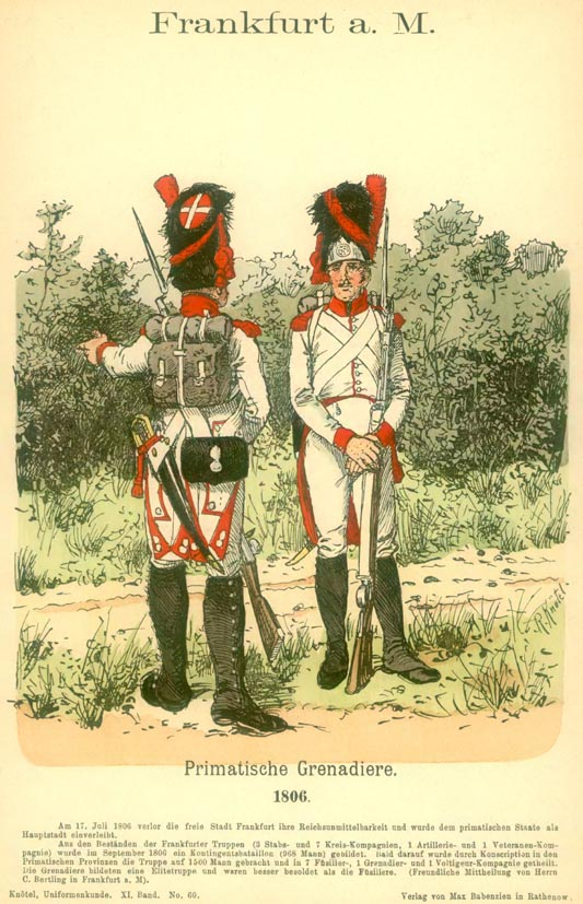 Иллюстрация Рихарда Кнотеля